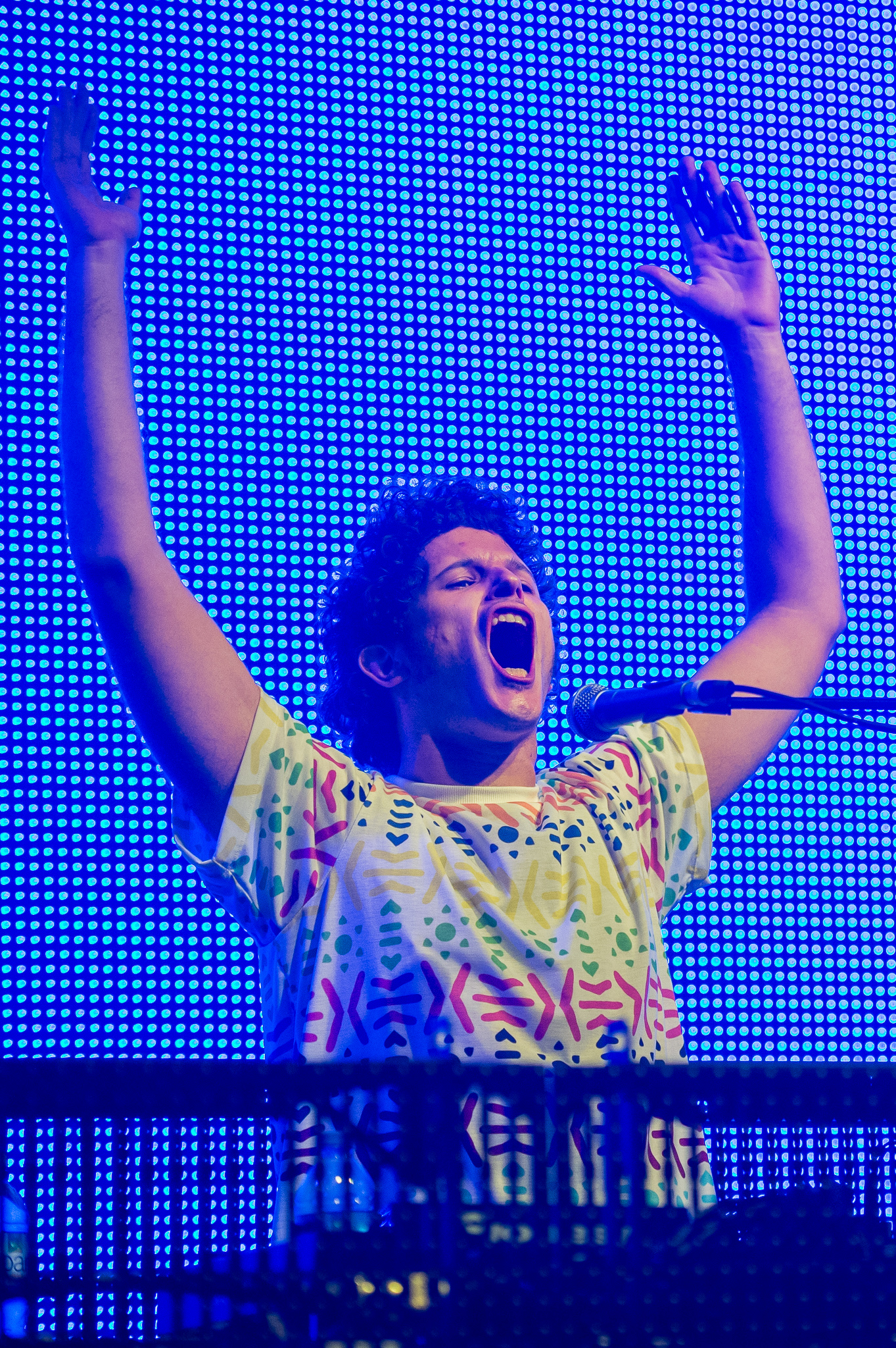 ARGO-Konzerte,Festival,Kid Simius,Konzert,Livekonzert,Livemusik,Musik,Pall Mall Club Tent,RiP,Rock im Park 2016